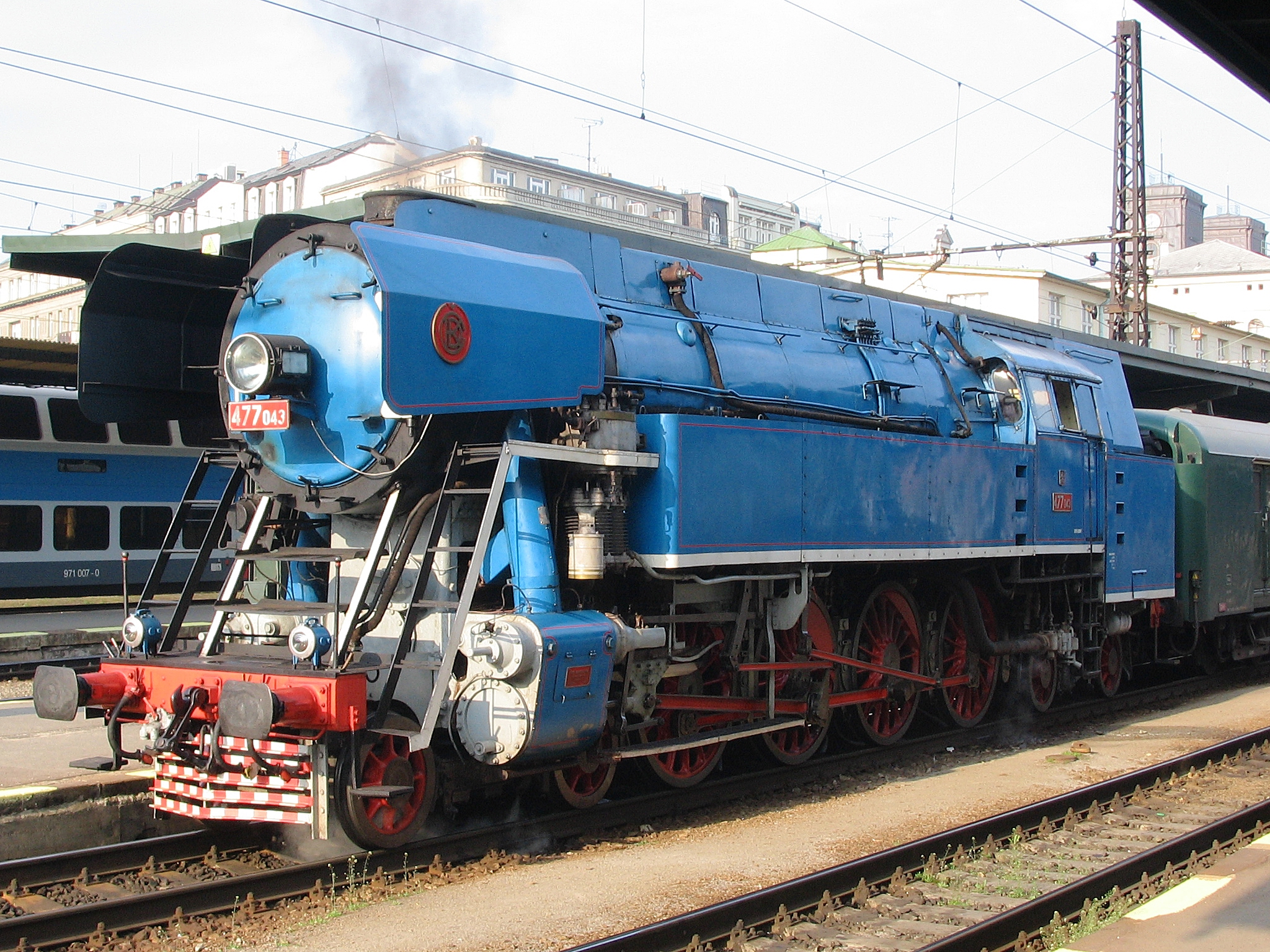 Papoušek 477.043, Masarykovo nádraží, Praha, 1. 5. 2005